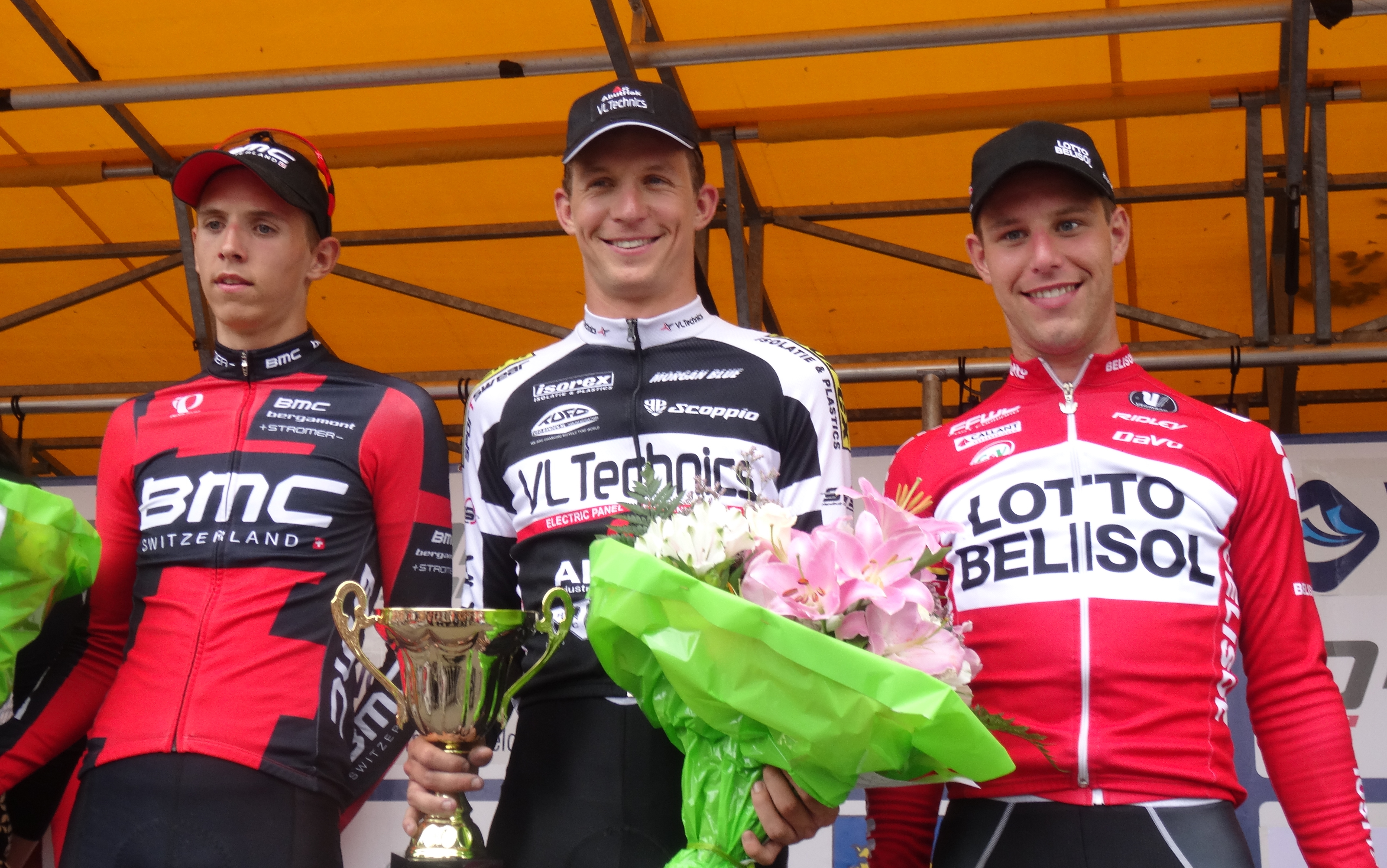 Reportage photographique réalisé le samedi 5 juillet à l'occasion du départ et de l'arrivée du Circuit Het Nieuwsblad espoirs 2014 à Grotenberge (Zottegem), Belgique.